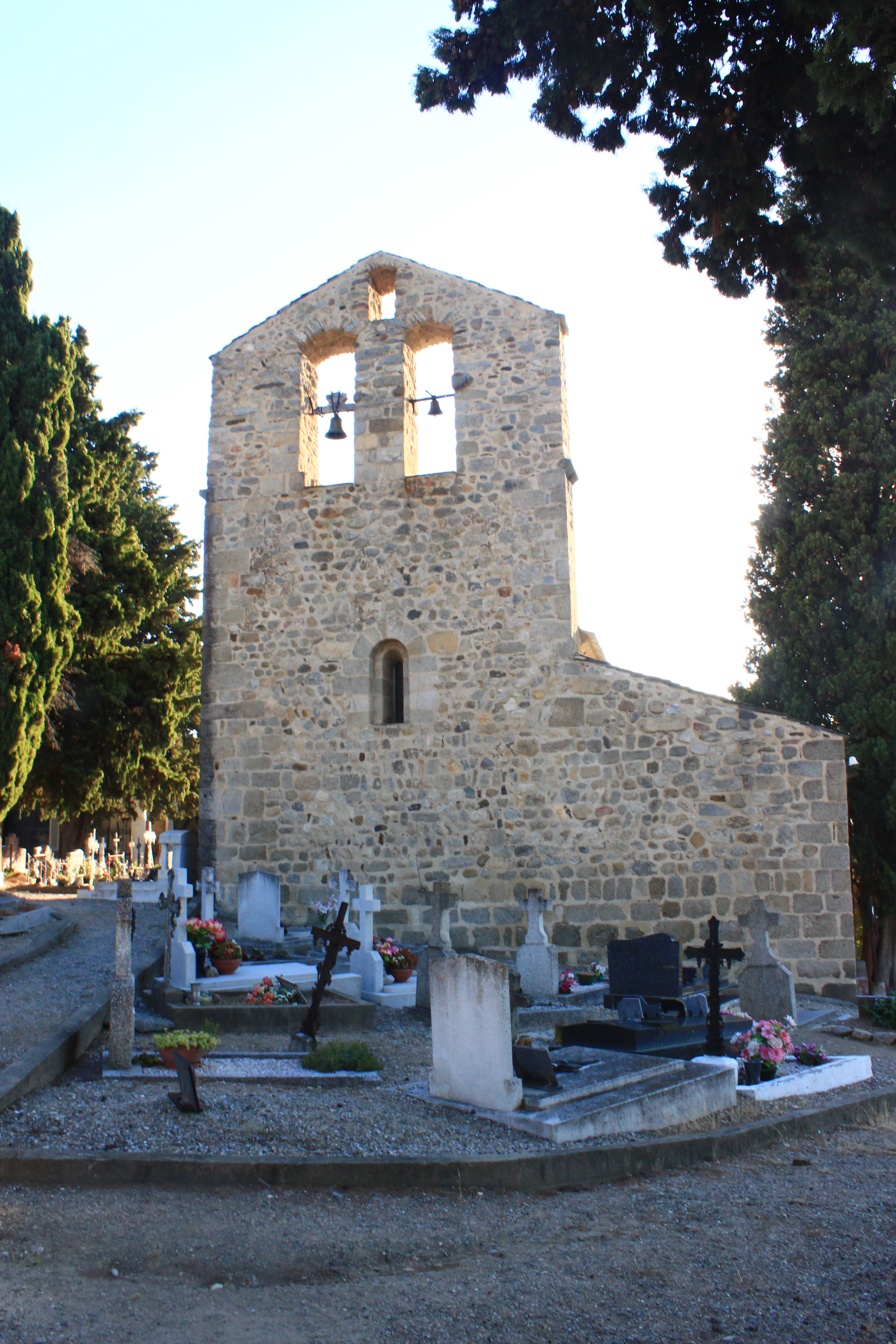 Eus (66) Un des plus beaux villages de France. L'ancienne église paroissiale Saint-Etienne et Saint-Vincent (église du bas)